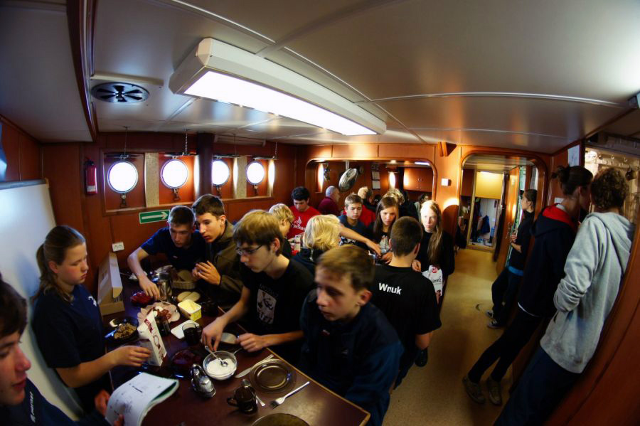 Szkoła pod Żaglami jesień 2012 - mesa załogantów